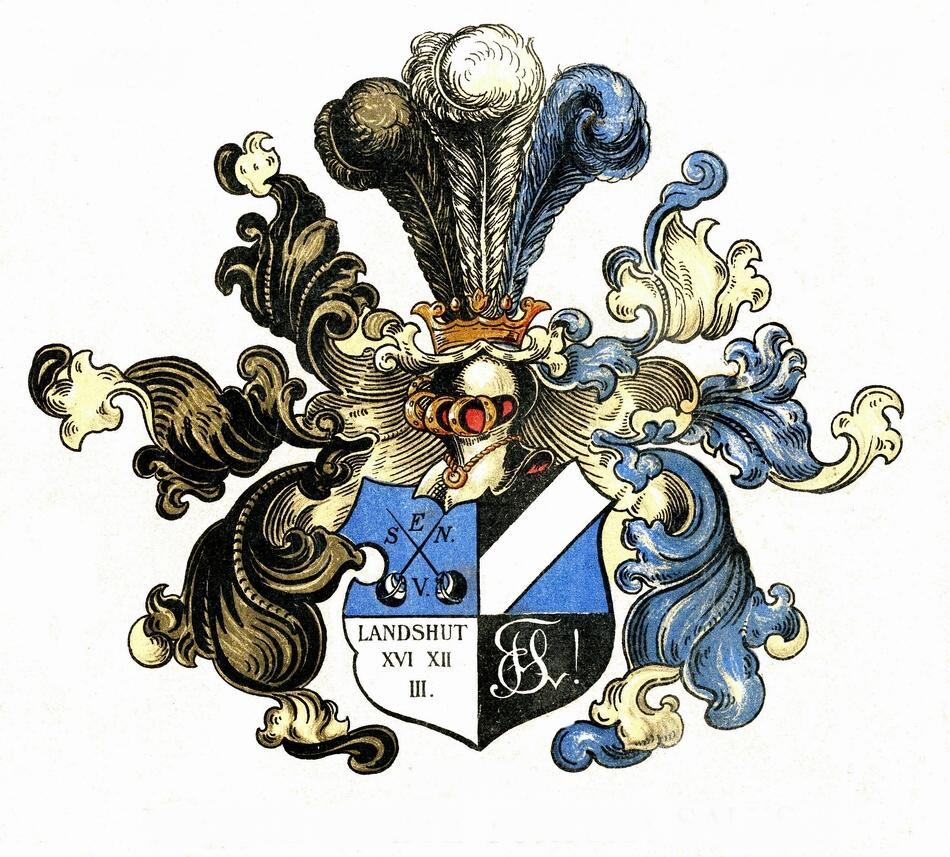 Studentenwappen des Corps Suevia München